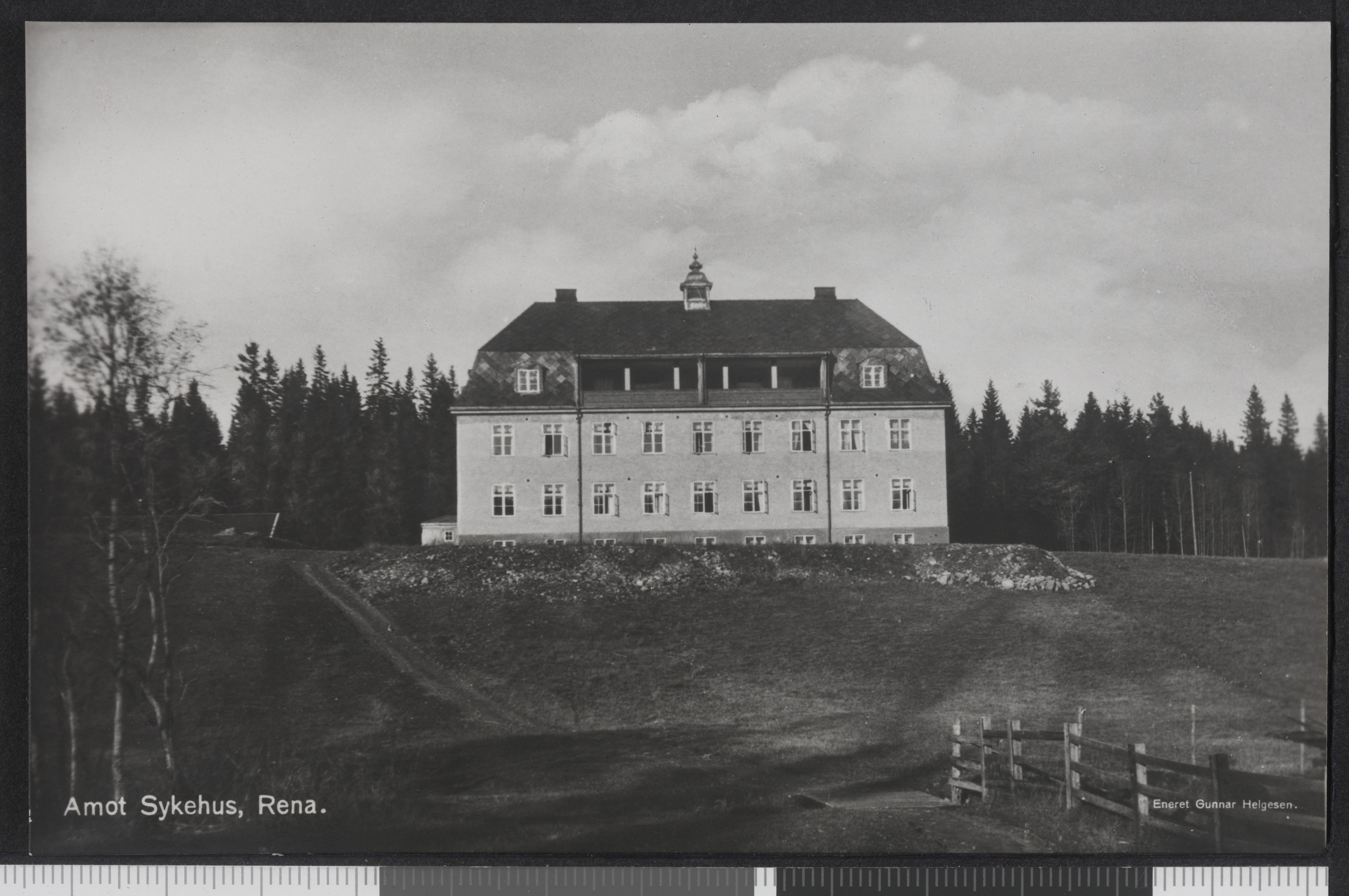 Bildet er hentet fra Nasjonalbibliotekets bildesamling Rena, Åmot, Hedmark